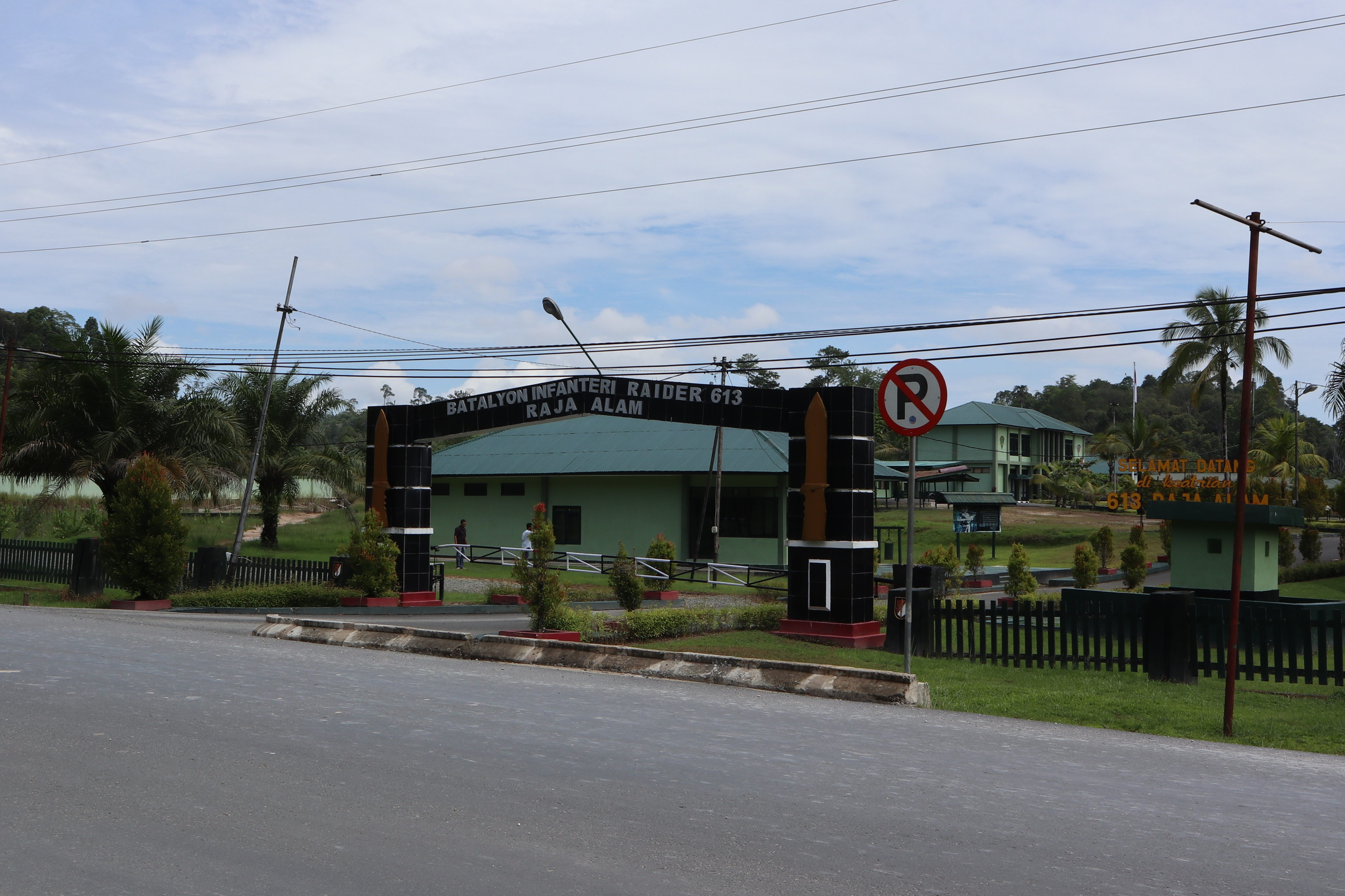 Markas Batalion Infanteri Raider 613 Raja Alam di Kota Tarakan, Kalimantan Utara.